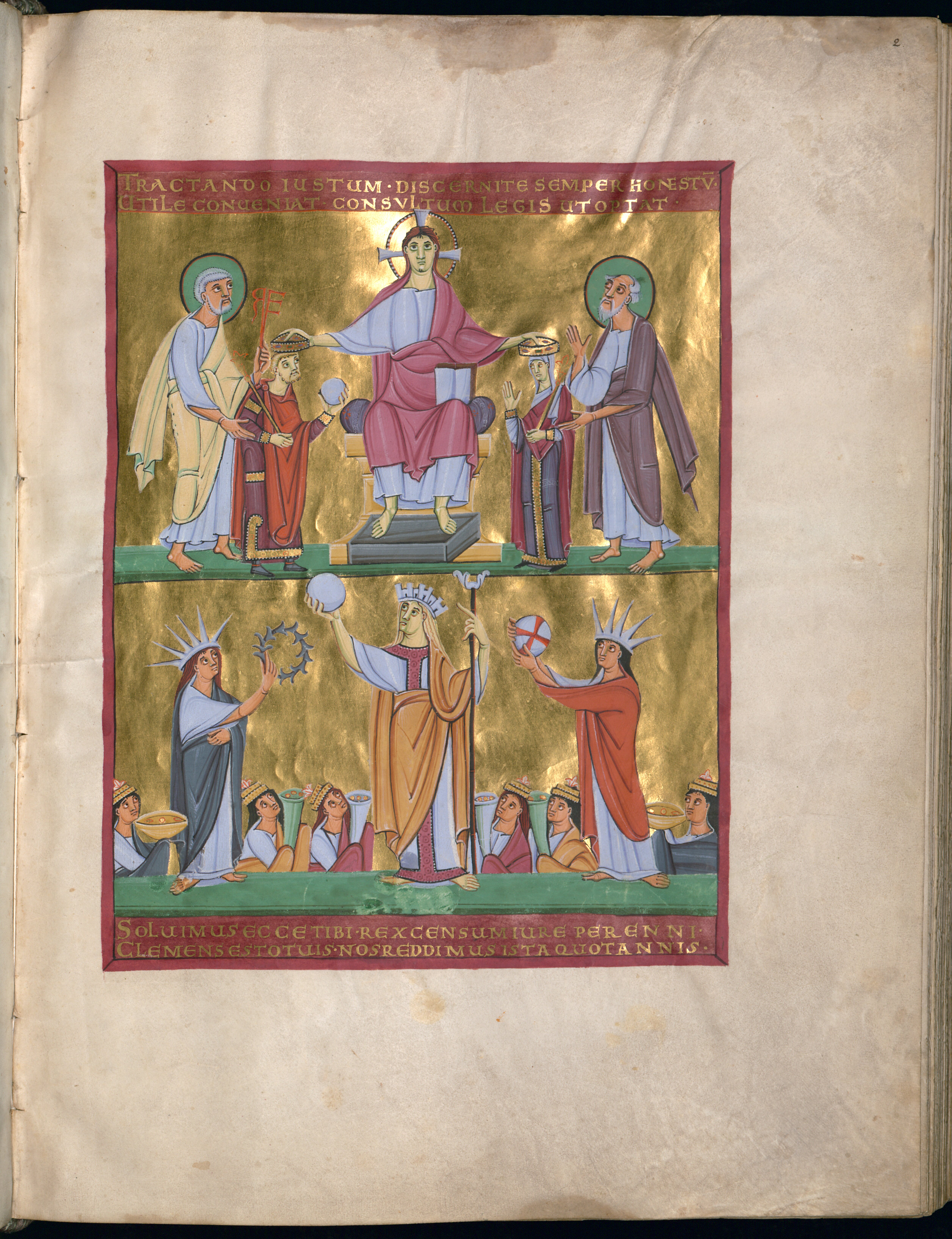 Aus dem Perikopenbuch Heinrichs II. (heute Bayrische Staatsbibliothek, CIm 4452, Fol. 2r) - Oben: Heinrich II. und Kunigunde von Christus gekrönt, hinter ihnen die Bamberger Patrone Petrus und Paulus. Unten: huldigende Personen und die Personifizierungen der Roma, Gallia und Germania Literatur: Anna Maria Cetto: Mittelalterliche Miniaturen